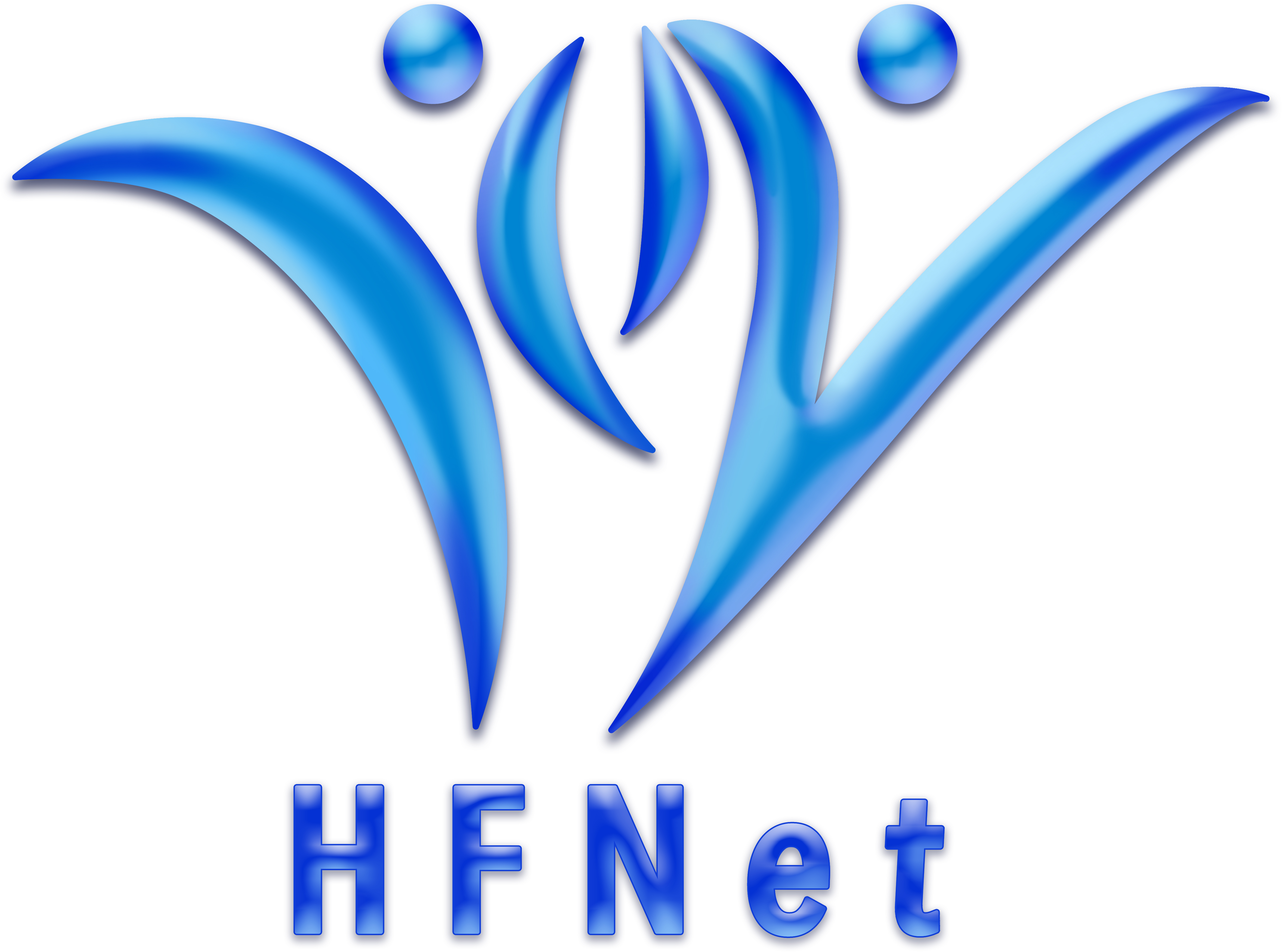 「健康食品」の安全性・有効性情報のウェブサイトのロゴマーク